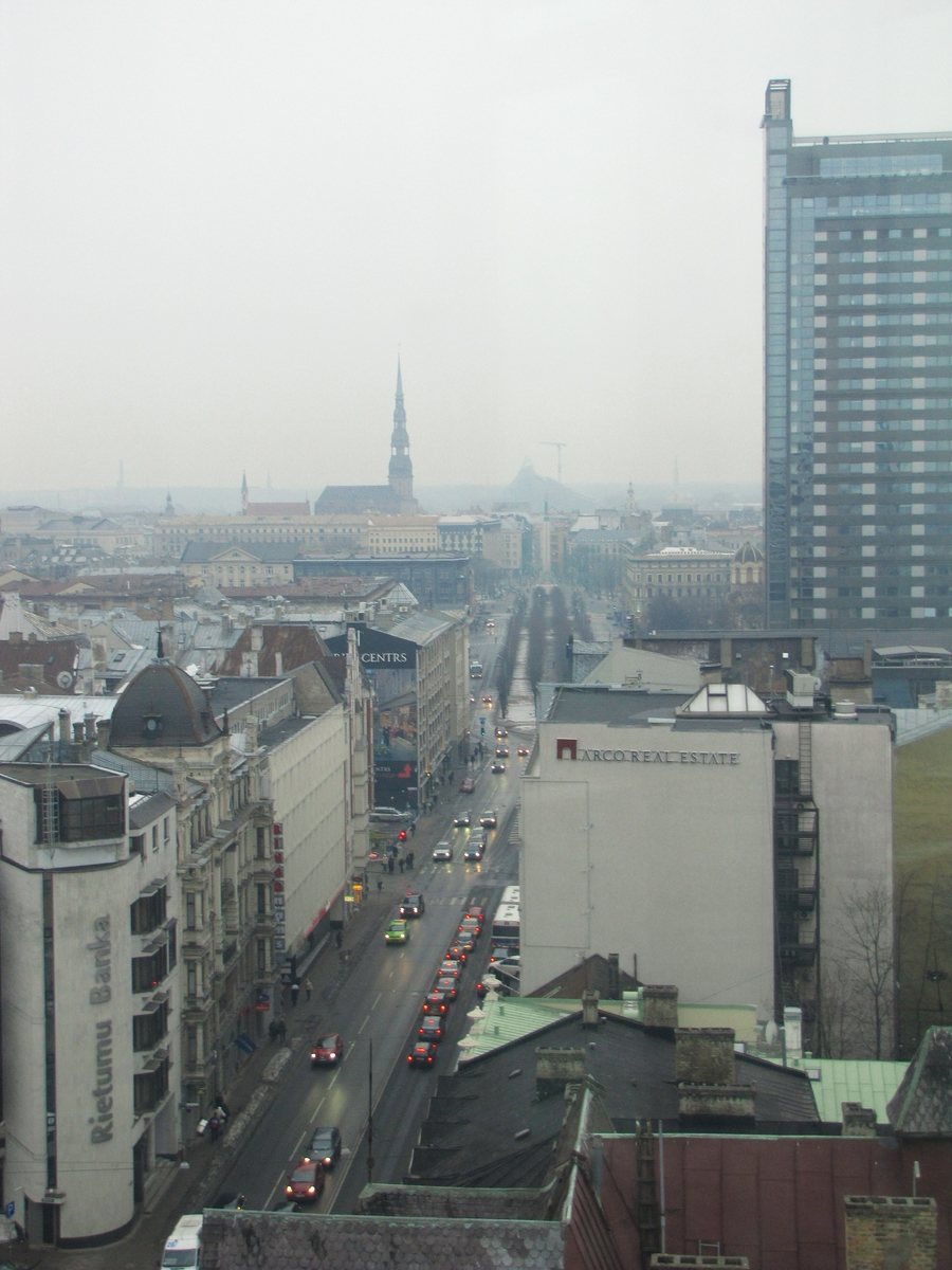 Lenina iela